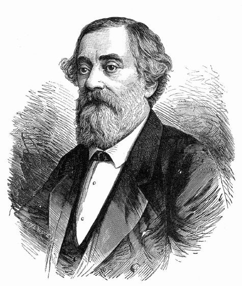 C.A. Rosetti